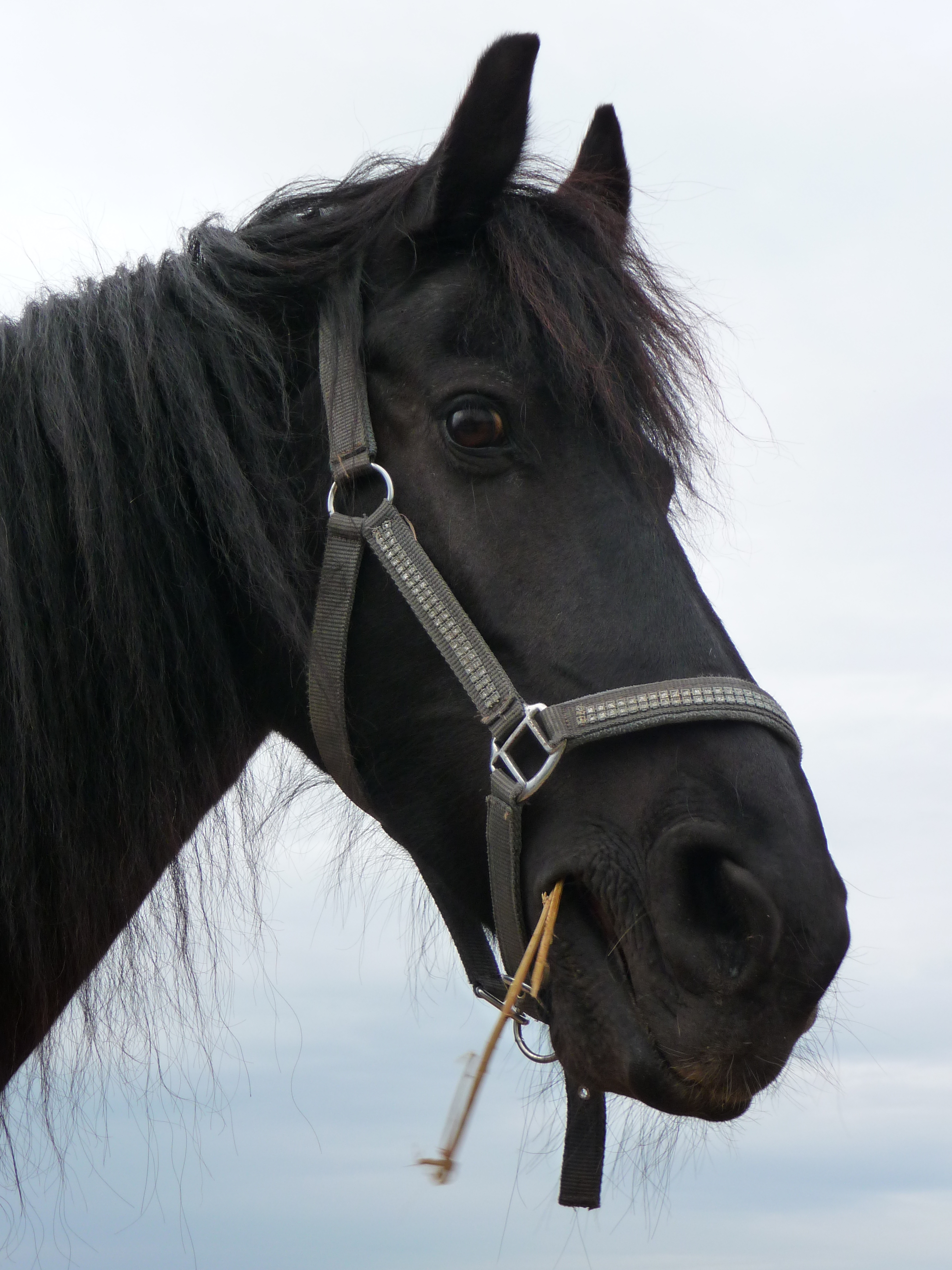 Kopf eines Friesen, fotografiert in Heidelberg (Baden-Württemberg, Deutschland)